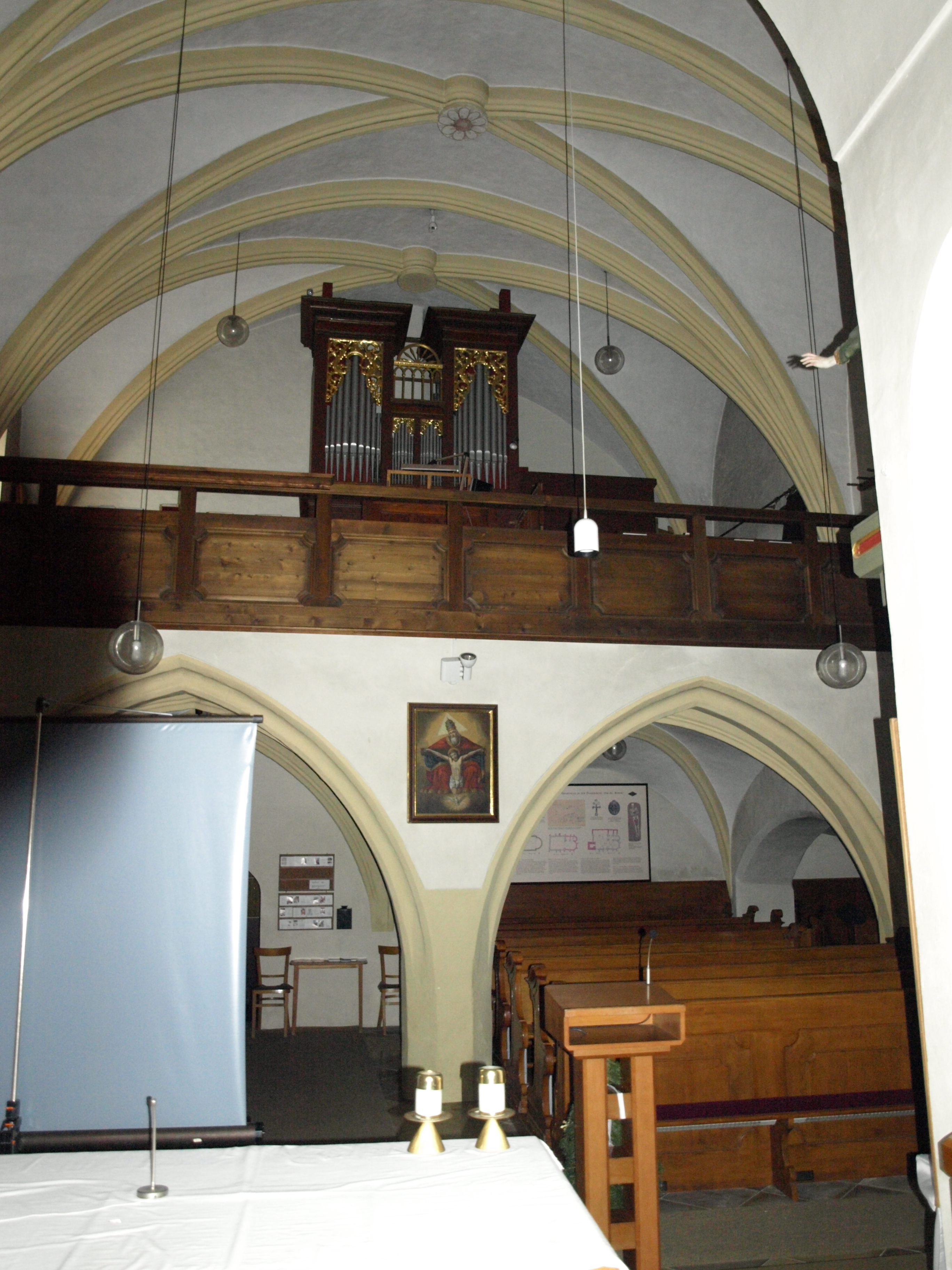 Kath. Pfarrkirche hl. Ruprecht